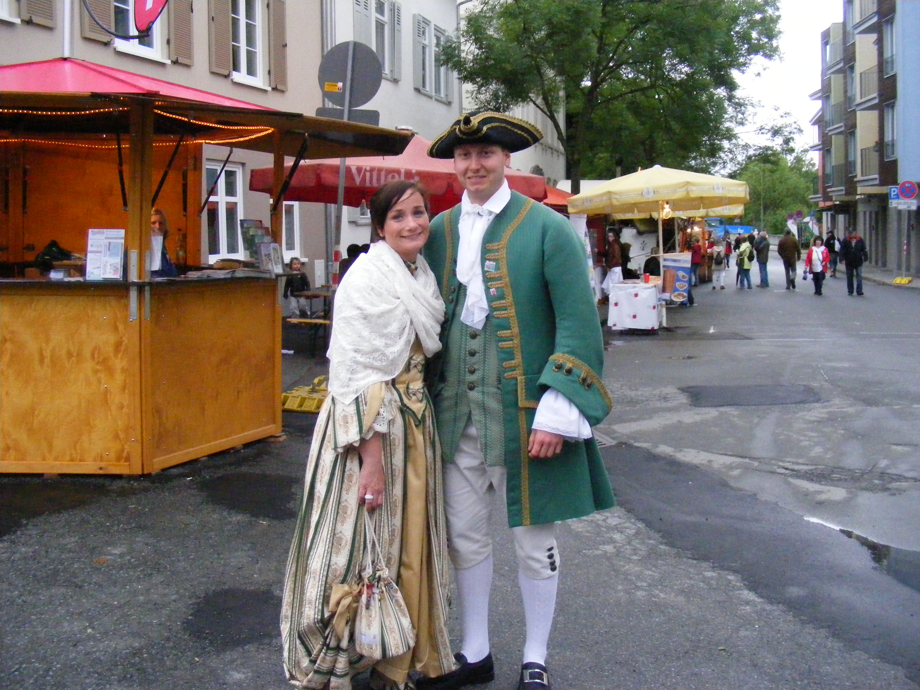 Das Wetzlarer Hessentagspaar Nina Becker und Florian Köhler (Steighausplatz)